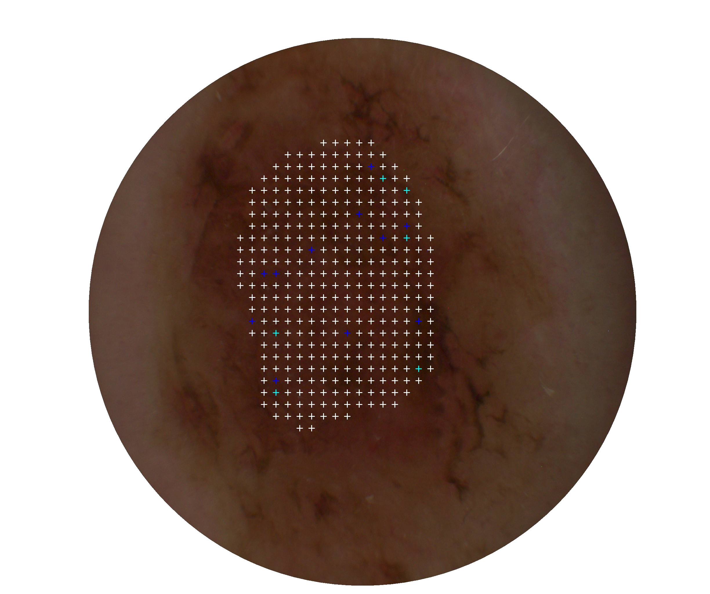 Der „universelle Fingerabdruck“ des schwarzen Hautkrebses ist eindeutig erkennbar. Eine auf KI basierende Datenanalyse erzeugt einen Score zur Unterstützung der fundierten Diagnose.